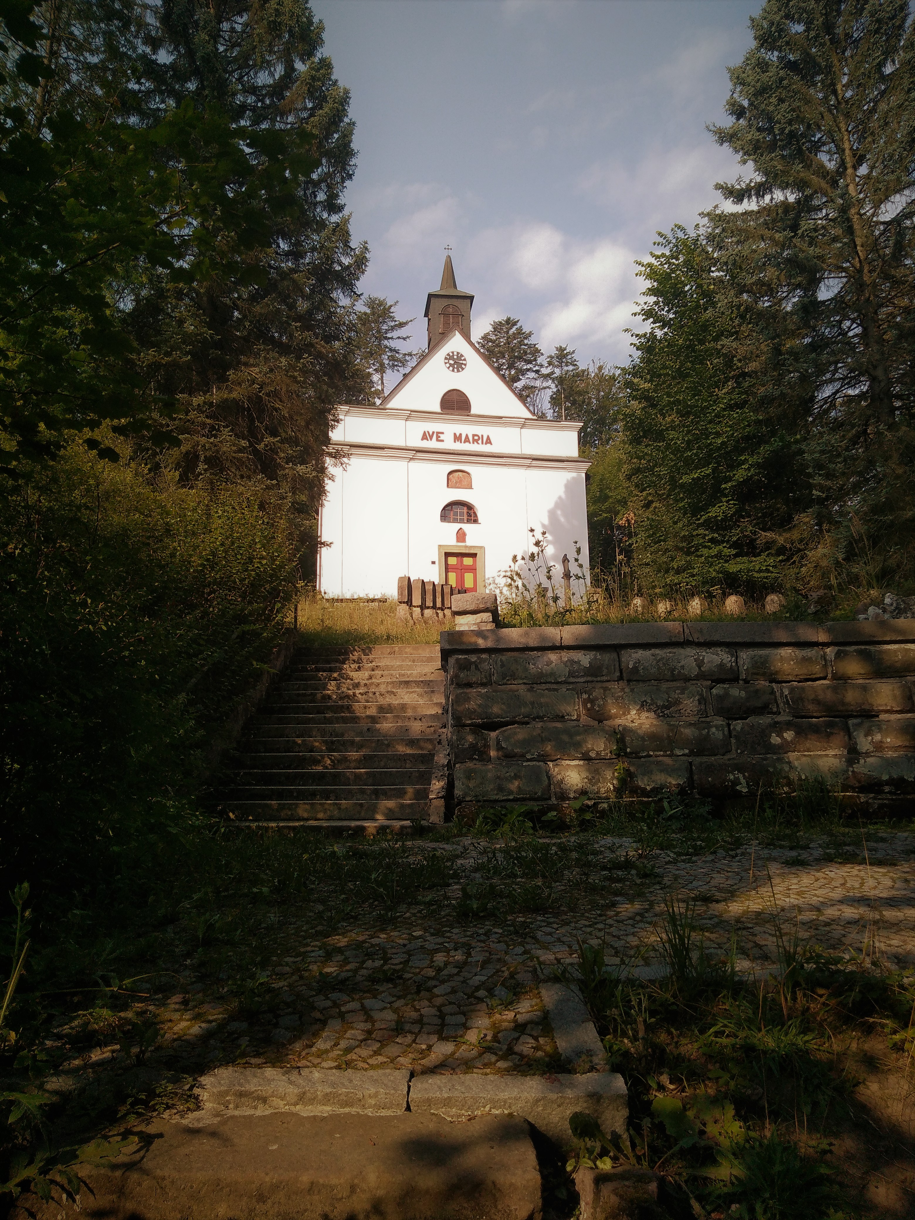 Kaple Panny Marie Pomocné Na Horách, Česká Třebová